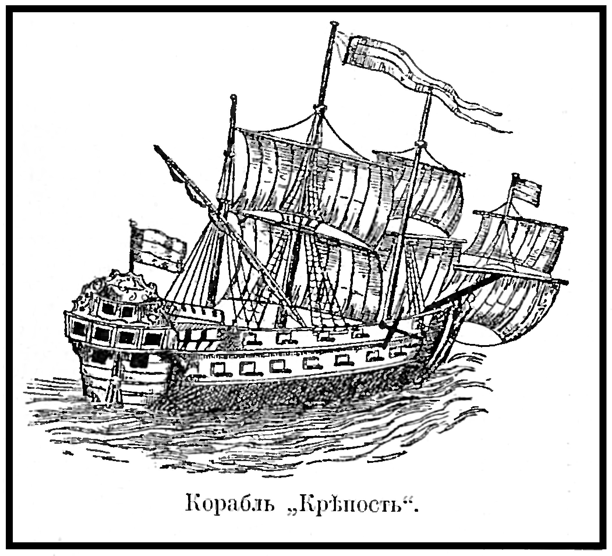 Корабль "Крепость". Данное изображение было использованое «Военной энциклопедии» изданной книгоиздательским товариществом Ивана Дмитриевича Сытина в статье «Азовский флот».